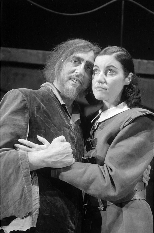 Original image description from the Deutsche Fotothek Szenenbilder